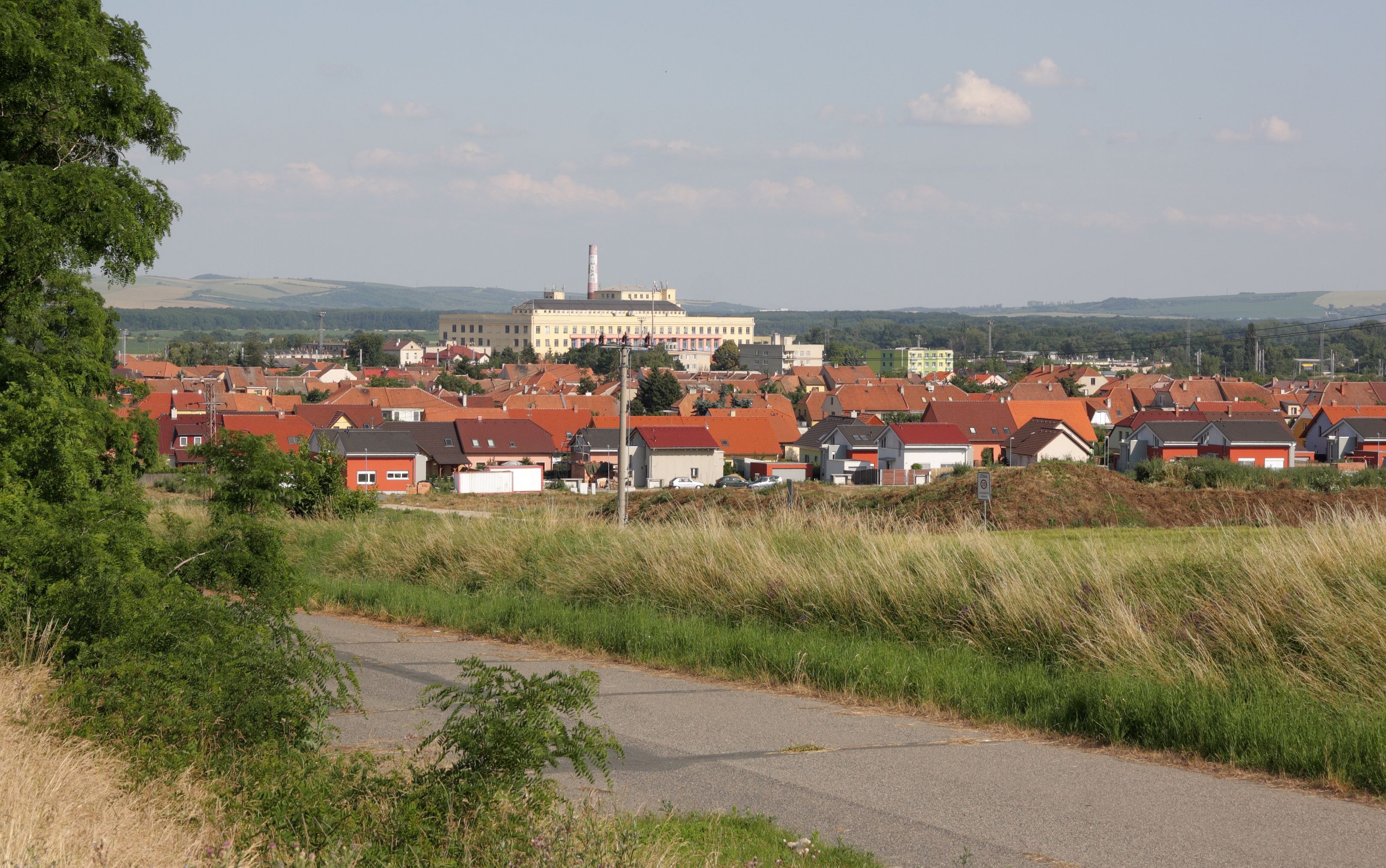 Hrušovany u Brna - pohled od severozápadu. V pozadí bývalý cukrovar.